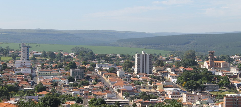 Vista de la Ciudad